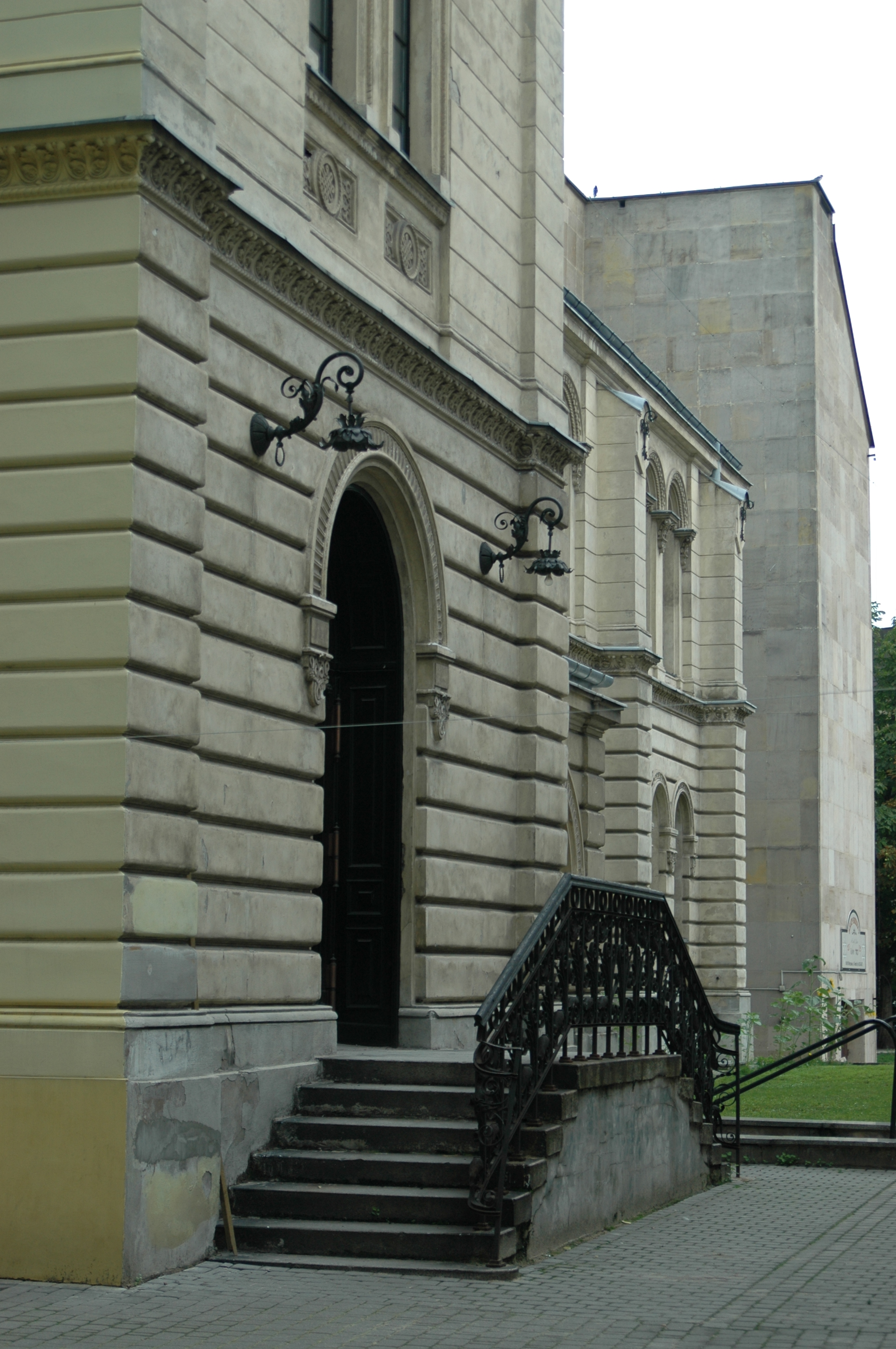 Nożyk Synagogue in Warsaw